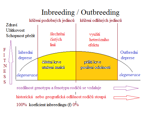 Rozdíl mezi inbreedingem a outbreedingem